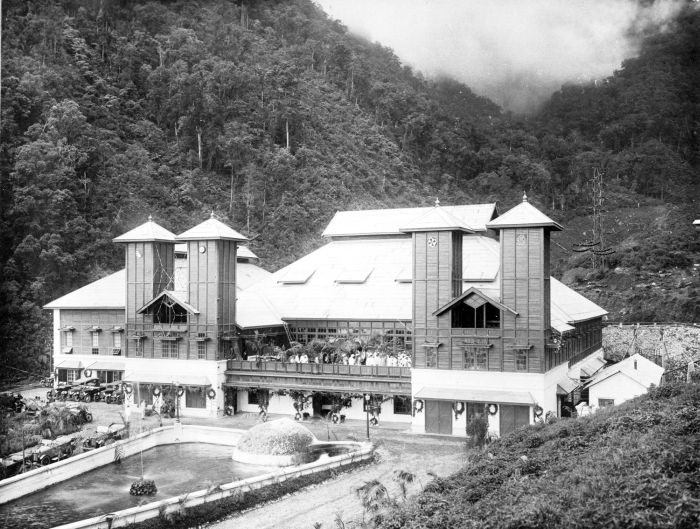 Foto. Het gebouw van het Gouvernements Radio Station Malabar